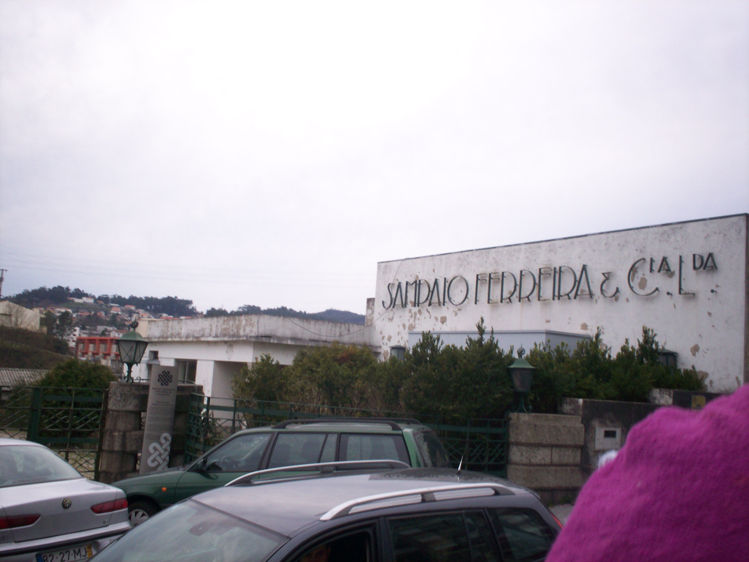 A fábrica mais antiga de Riba de Ave e uma das mais antigas de Portugal até ao seu recente encerramento.